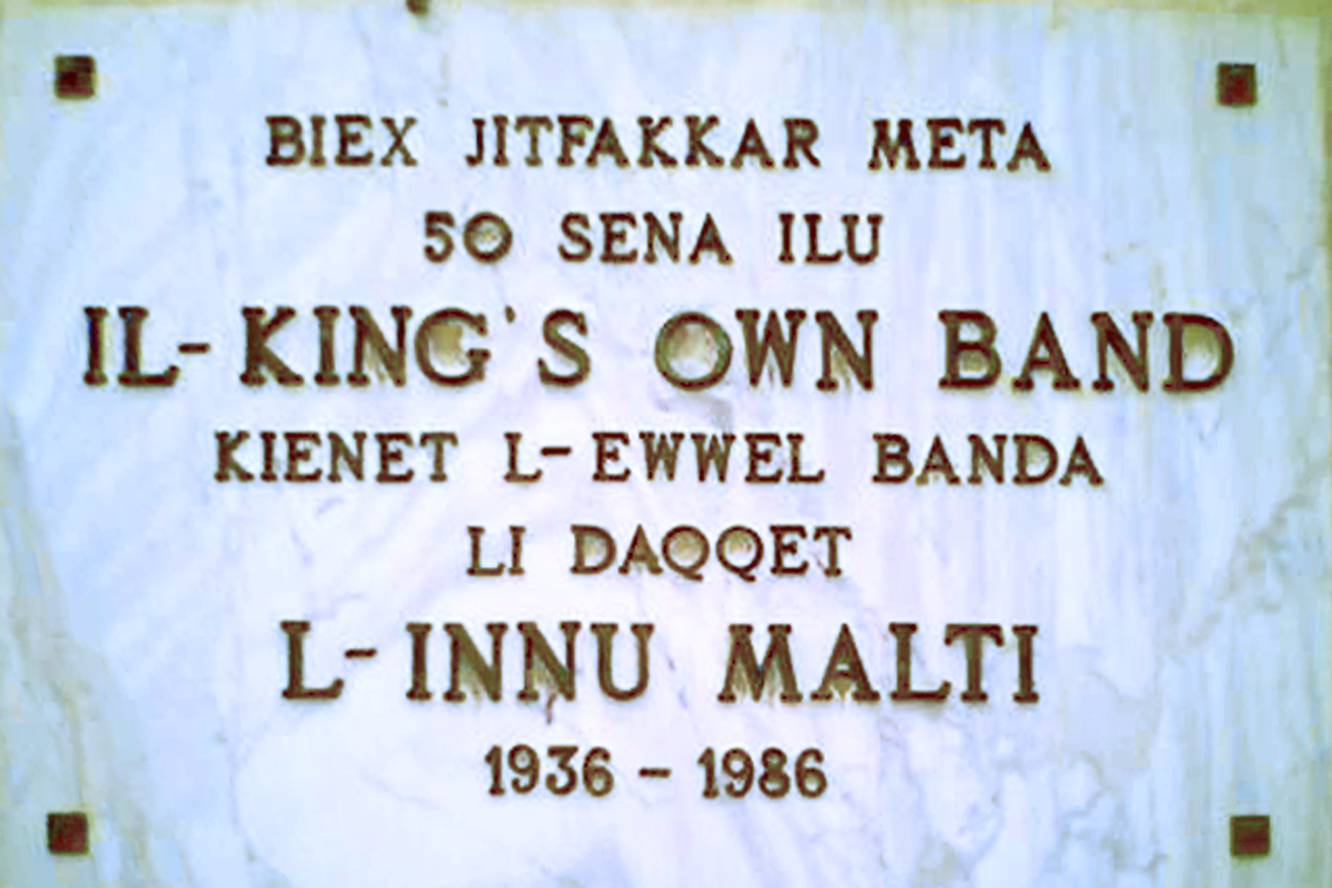 plaque commémorative de la première représentation de l'hymne maltais dans les jardins du Saint-George’s Square